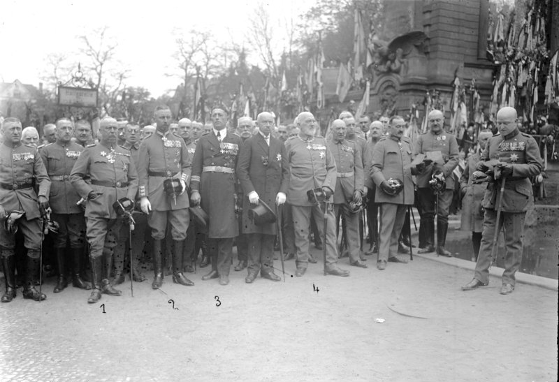 Der große deutsche Tag in Halle, an welchem große Heerführer und tausende Nationalgesinnter teilnahmen, um das vor einem Jahr von Kommunisten zerstörte Moltkedenkmal wieder einzuweihen. General [Erich] Ludendorff 1, Prinz [Oskar] 2, [Felix] Graf Luckner 3, und [Josias] von Heeringen während der Feier.